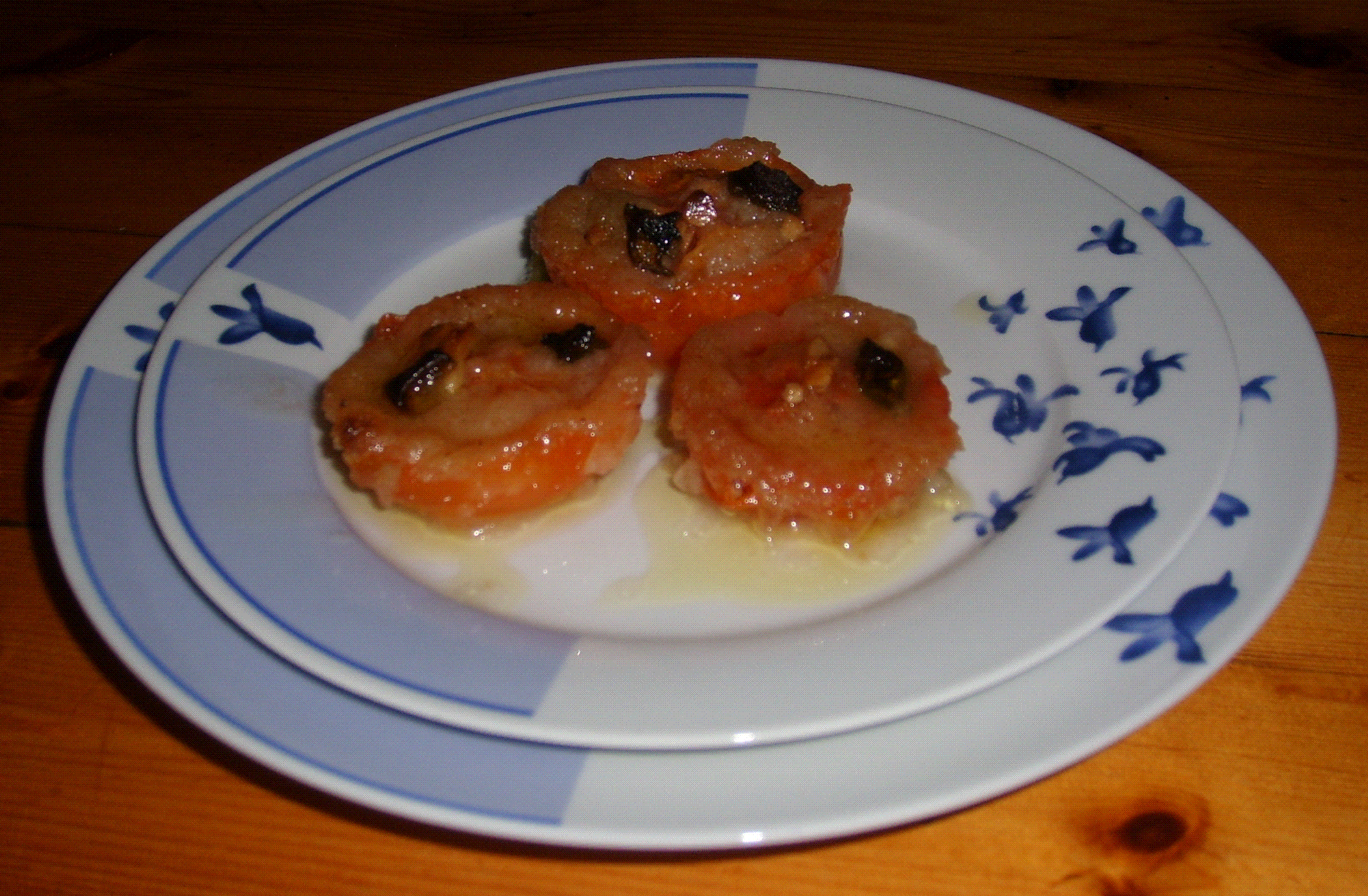 Plat típic menorquí